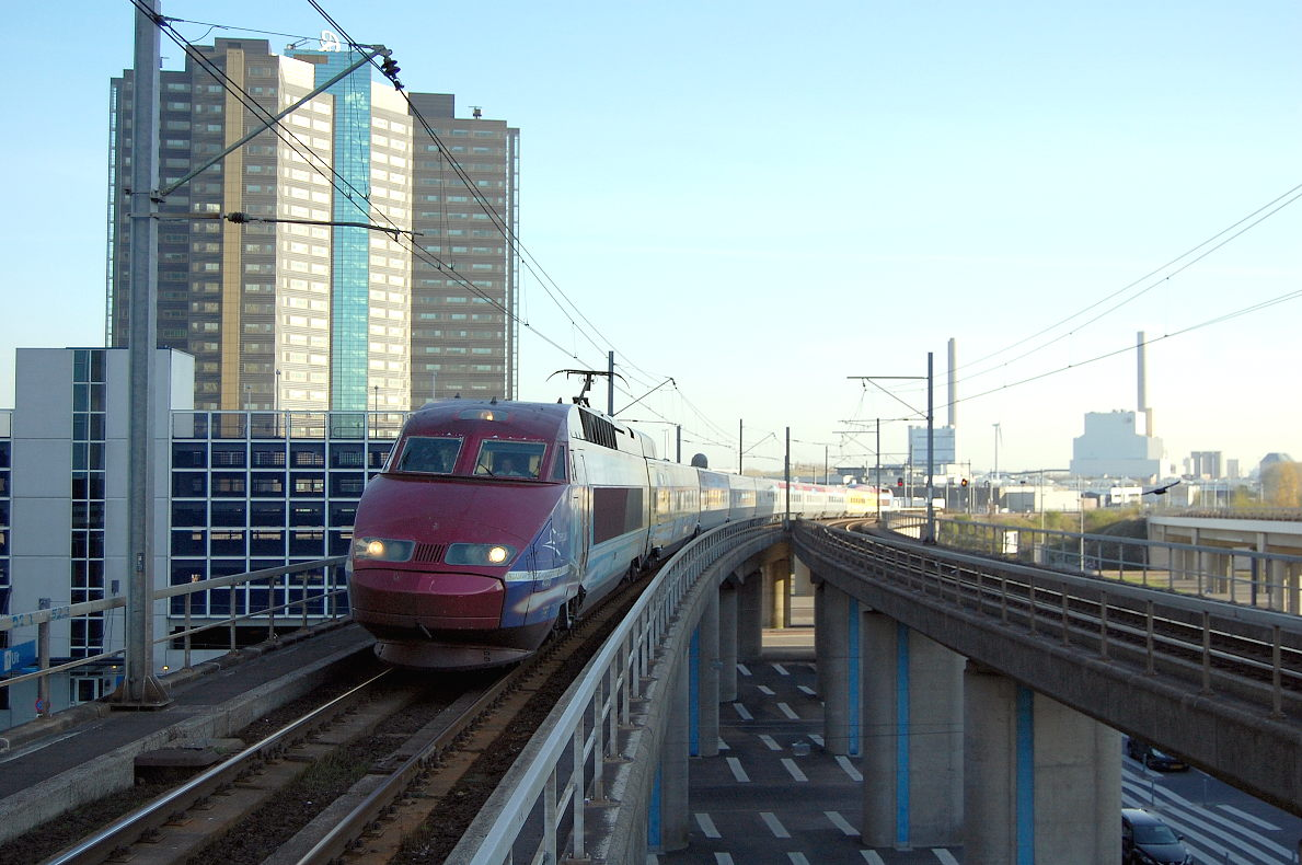 Ook had ik weer een ontmoeting met de Tour-Thalys. Te zien onder de trein het Piarcospoorviaduct en daaronder het Piarcoplein